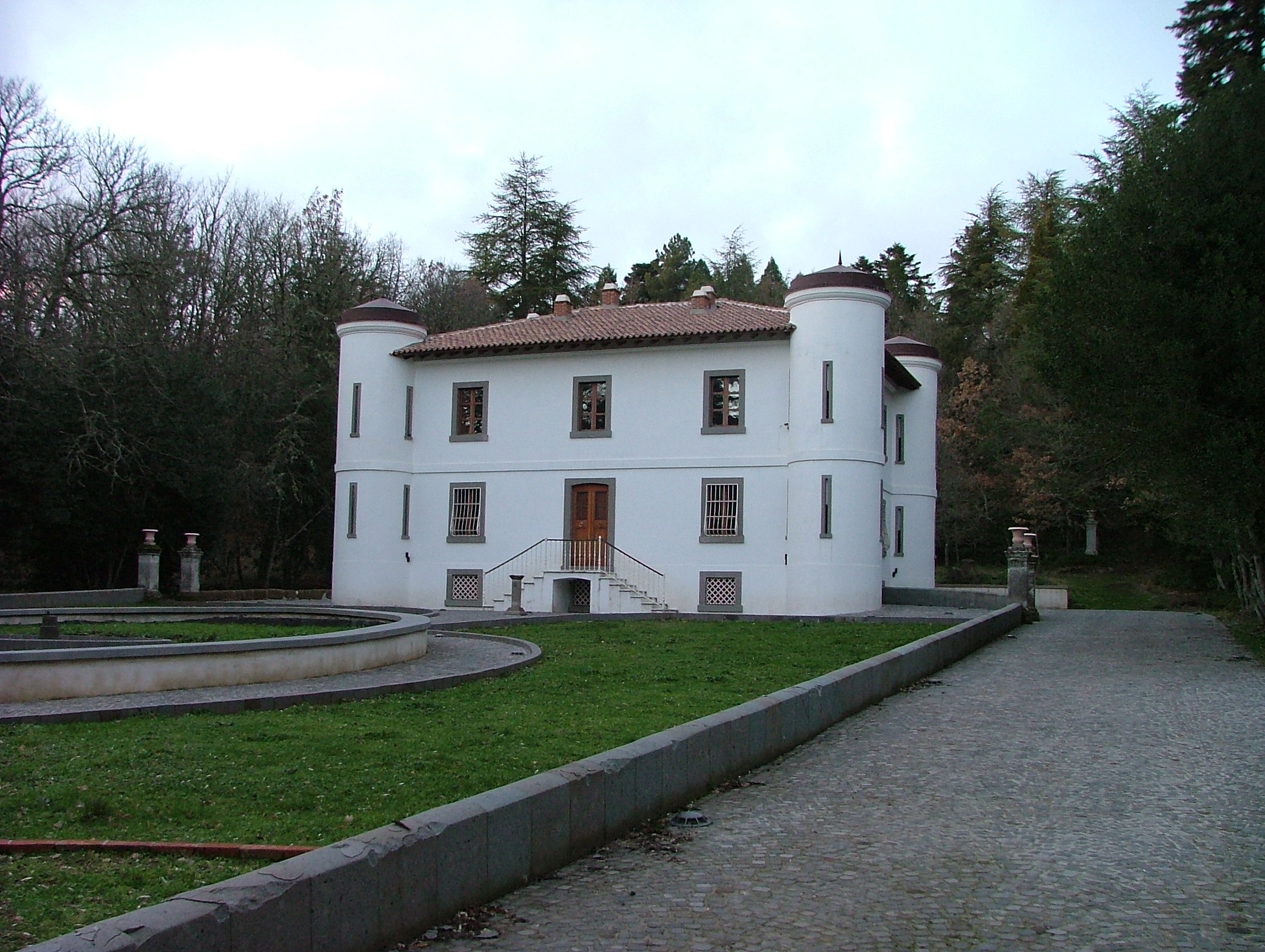 Villa Piercy